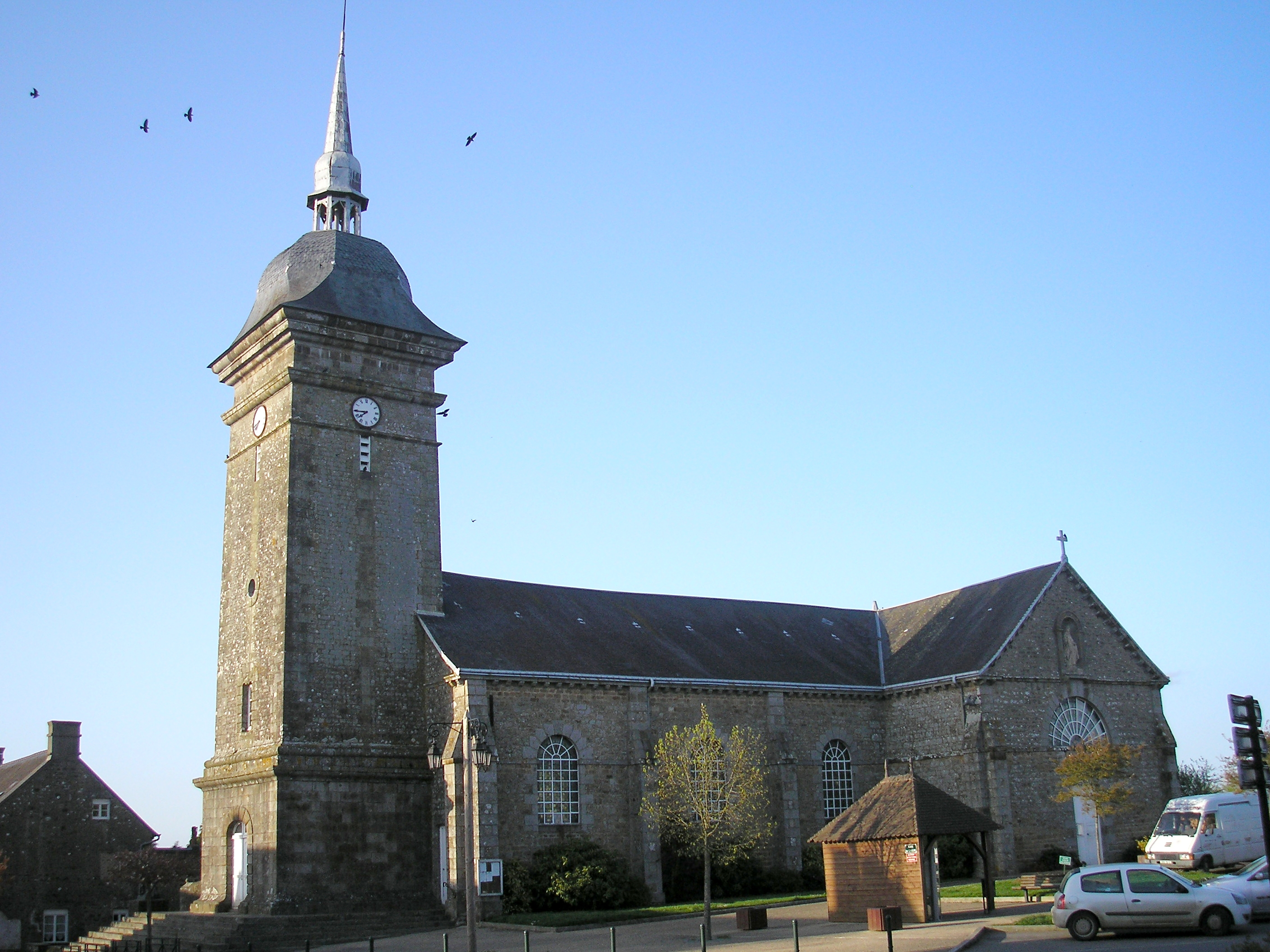 Saint-Bômer-les-Forges (Normandie, France). L'église Saint-Bômer.